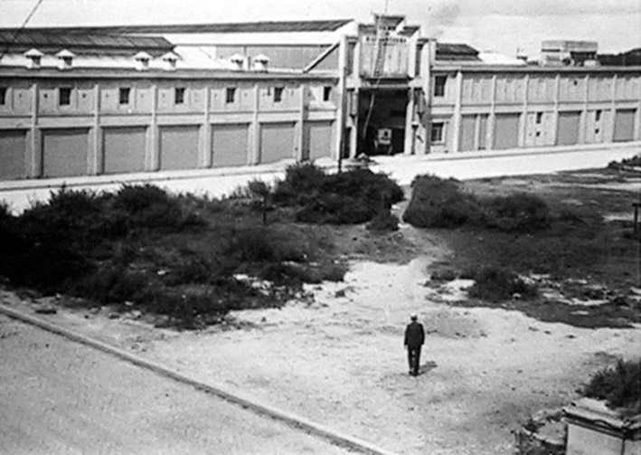 panorámica del ex-mercado de pescado